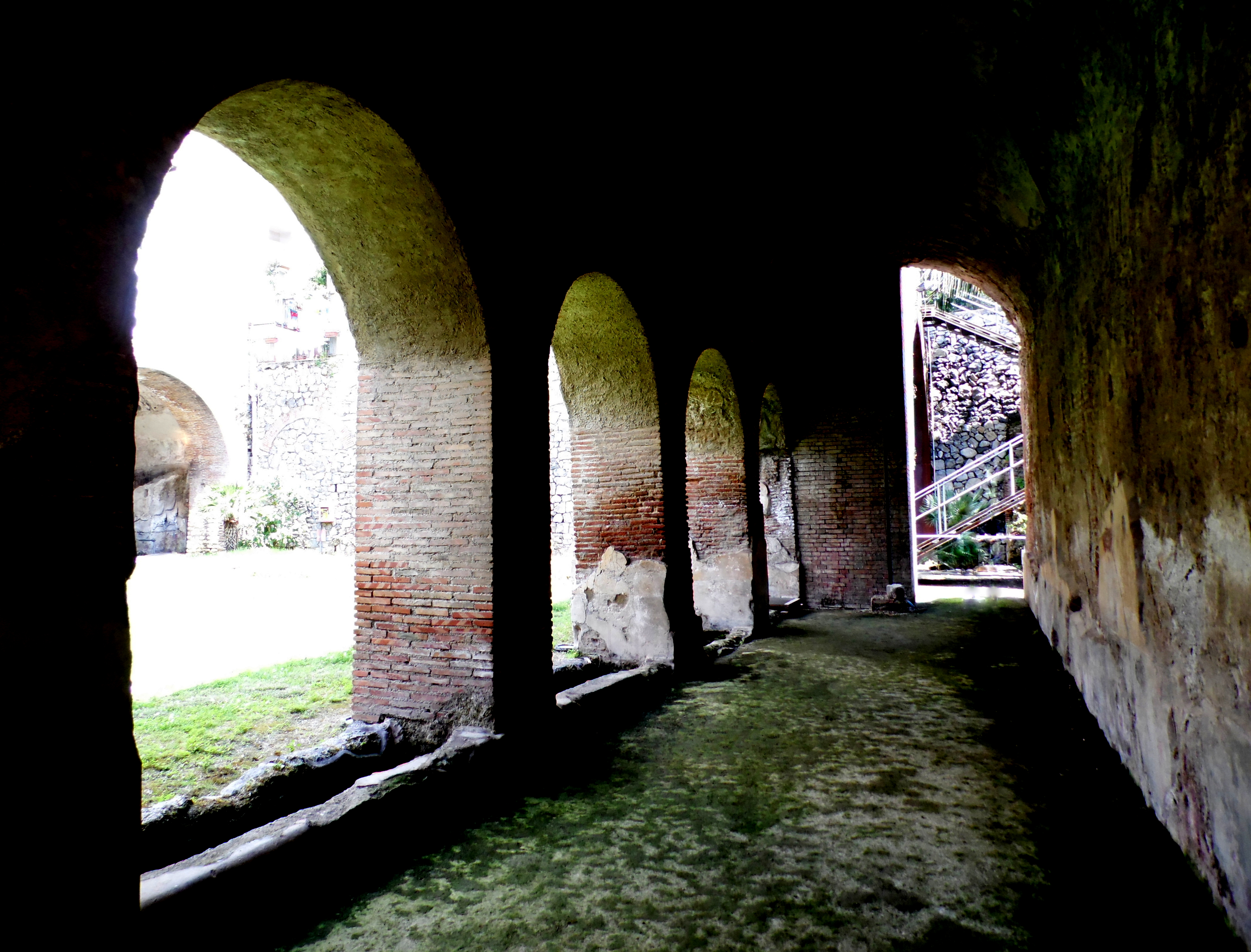 Villa romana di Minori - MIBAC This is a photo of a monument which is part of cultural heritage of Italy.